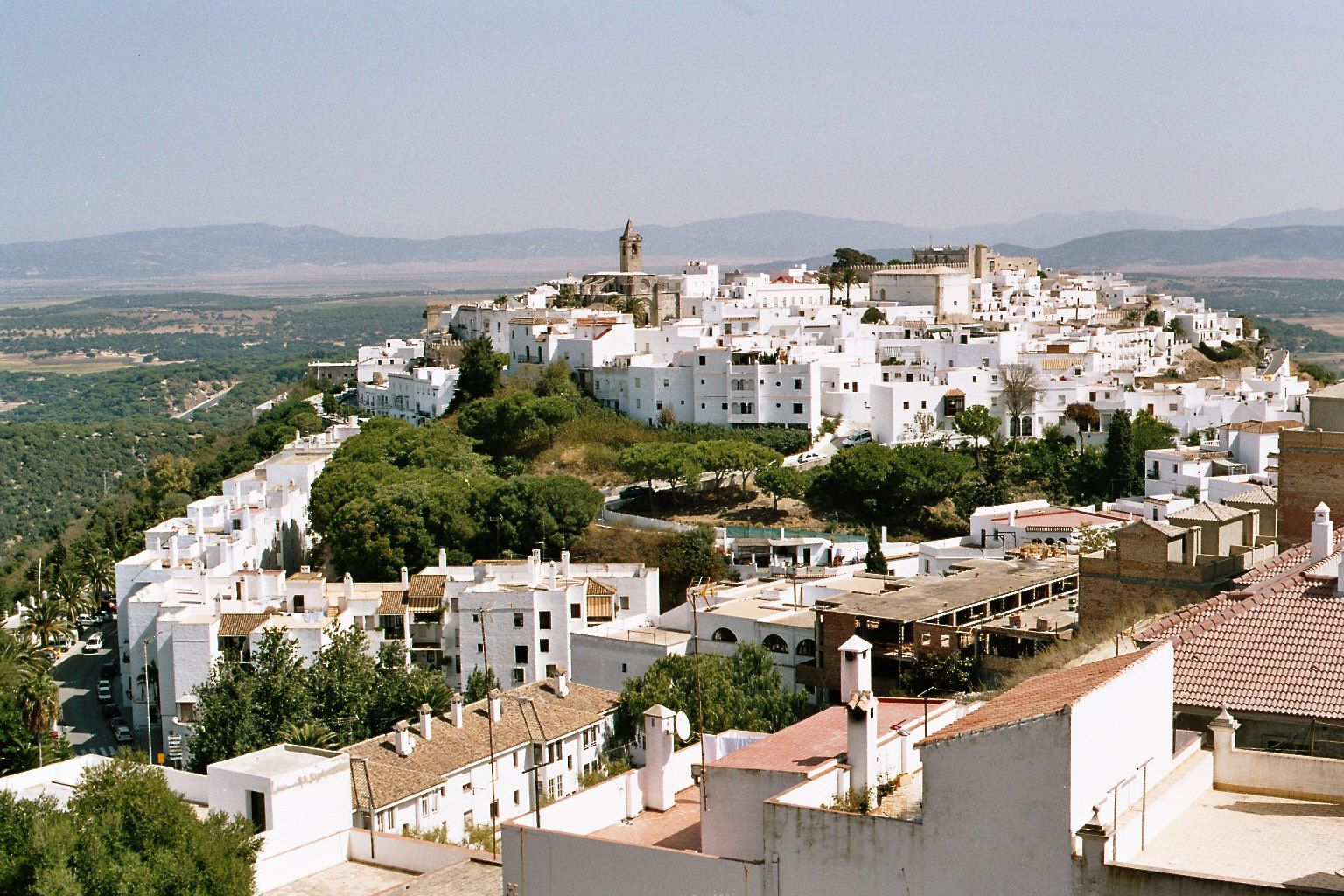 Vejer de la Frontera, selbst fotografiert, Sept. 2004, GNU-FDL